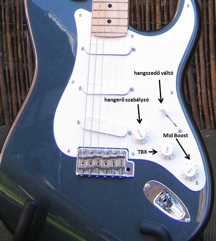 Eric Clapton Stratocaster szabályzók